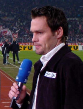 VfB-Spieler Silvio Meissner (r.) im Gottlieb-Daimler-Stadion mit Michael Antwerpes vom SWR